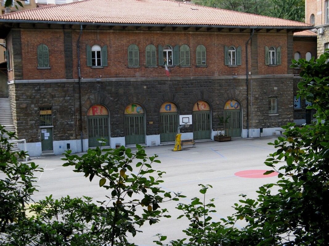 Ricreatorio de Amicis, Trieste.